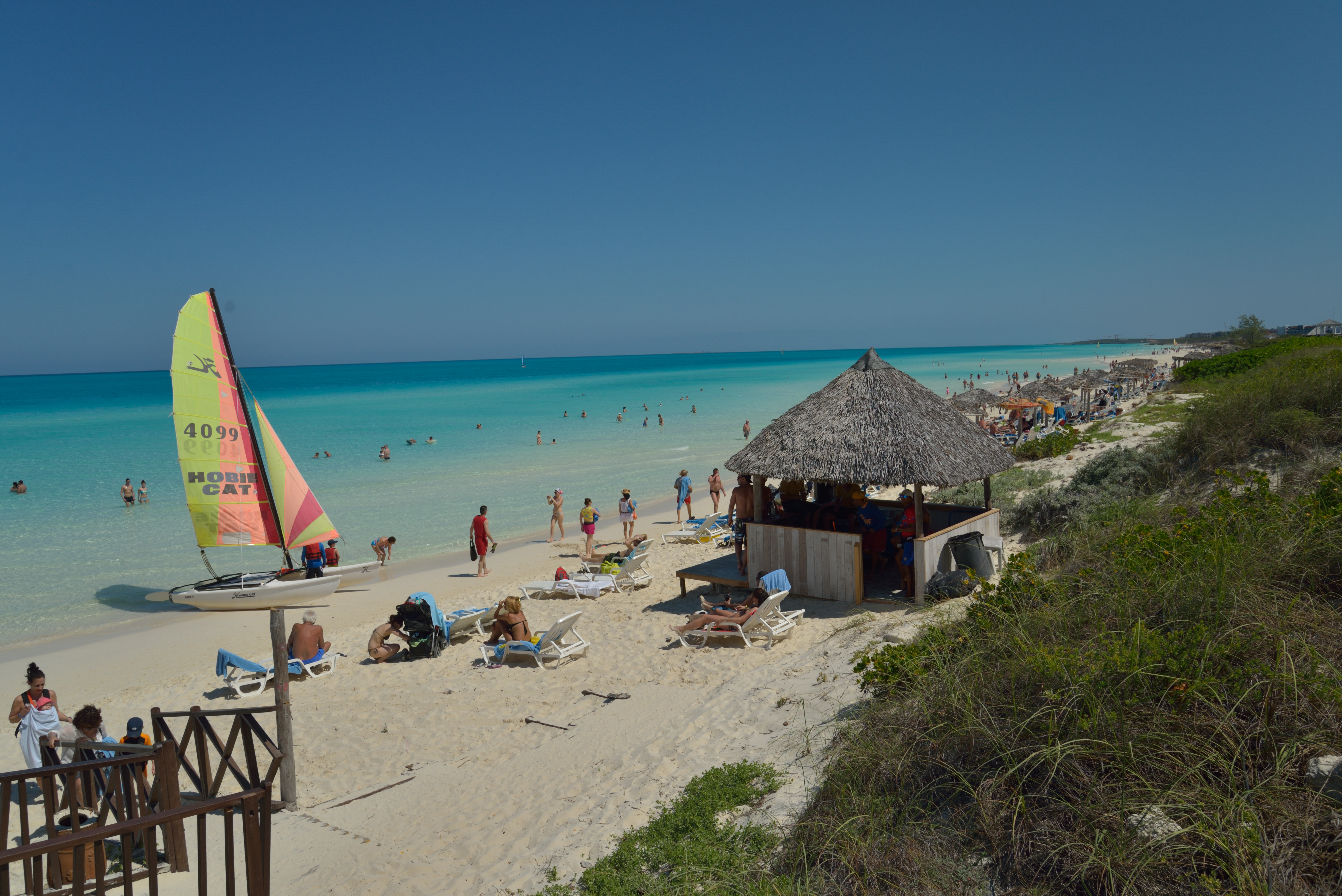 la plage